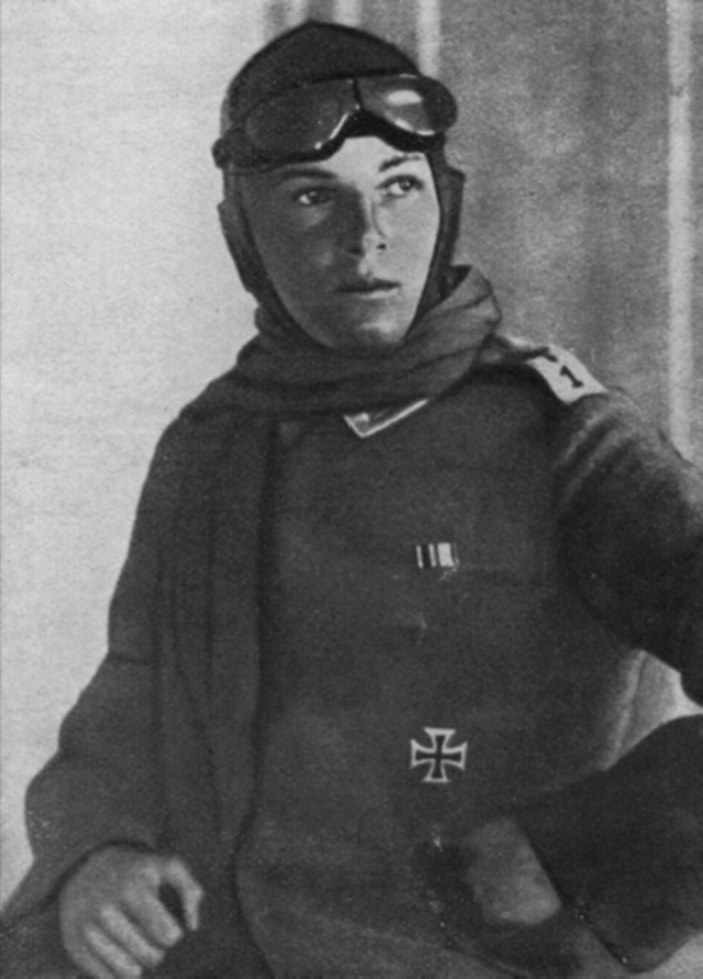 fighter ace WWI